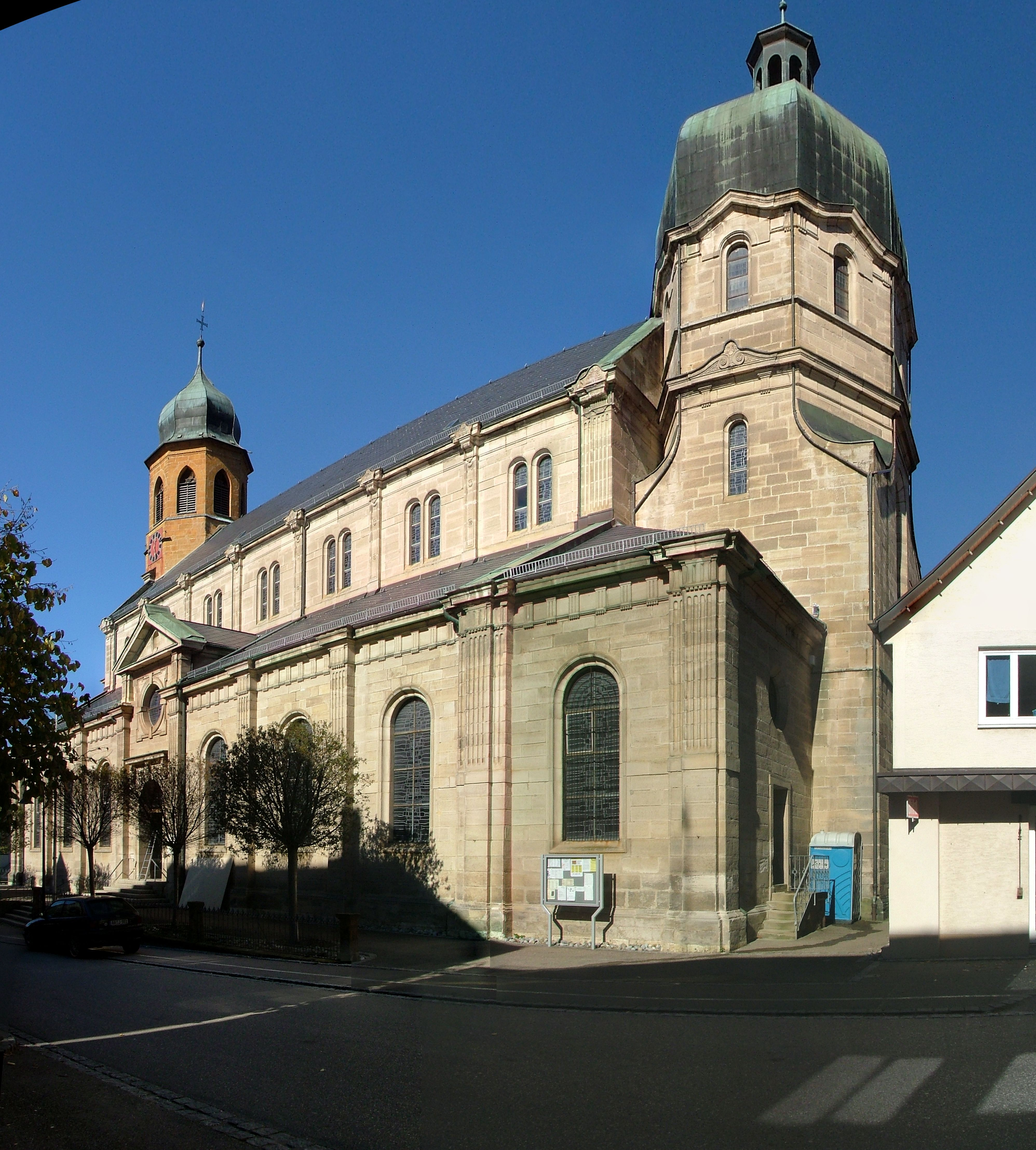 Lauchheim